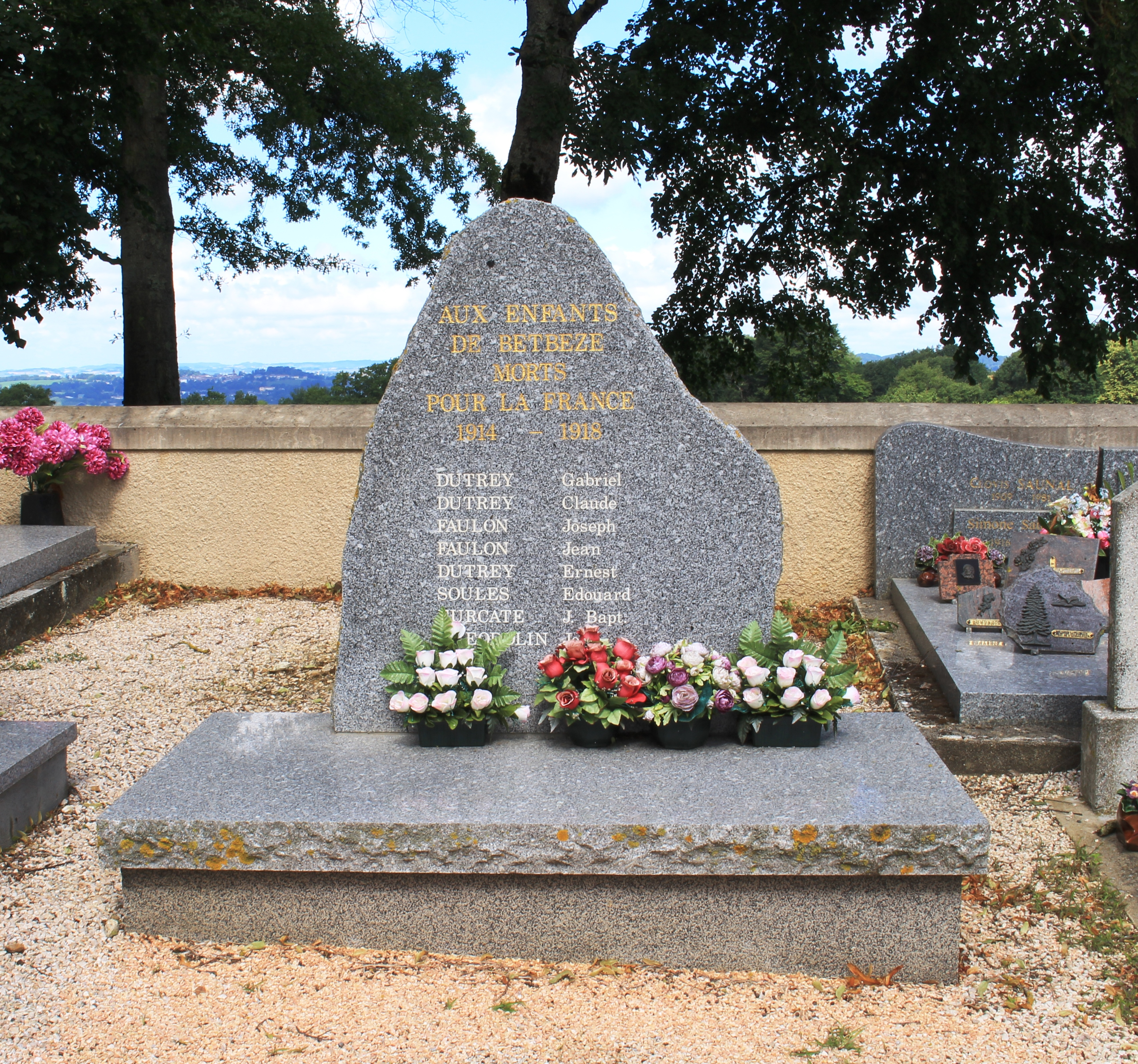 Monument aux morts de Betbèze (Hautes-Pyrénées)